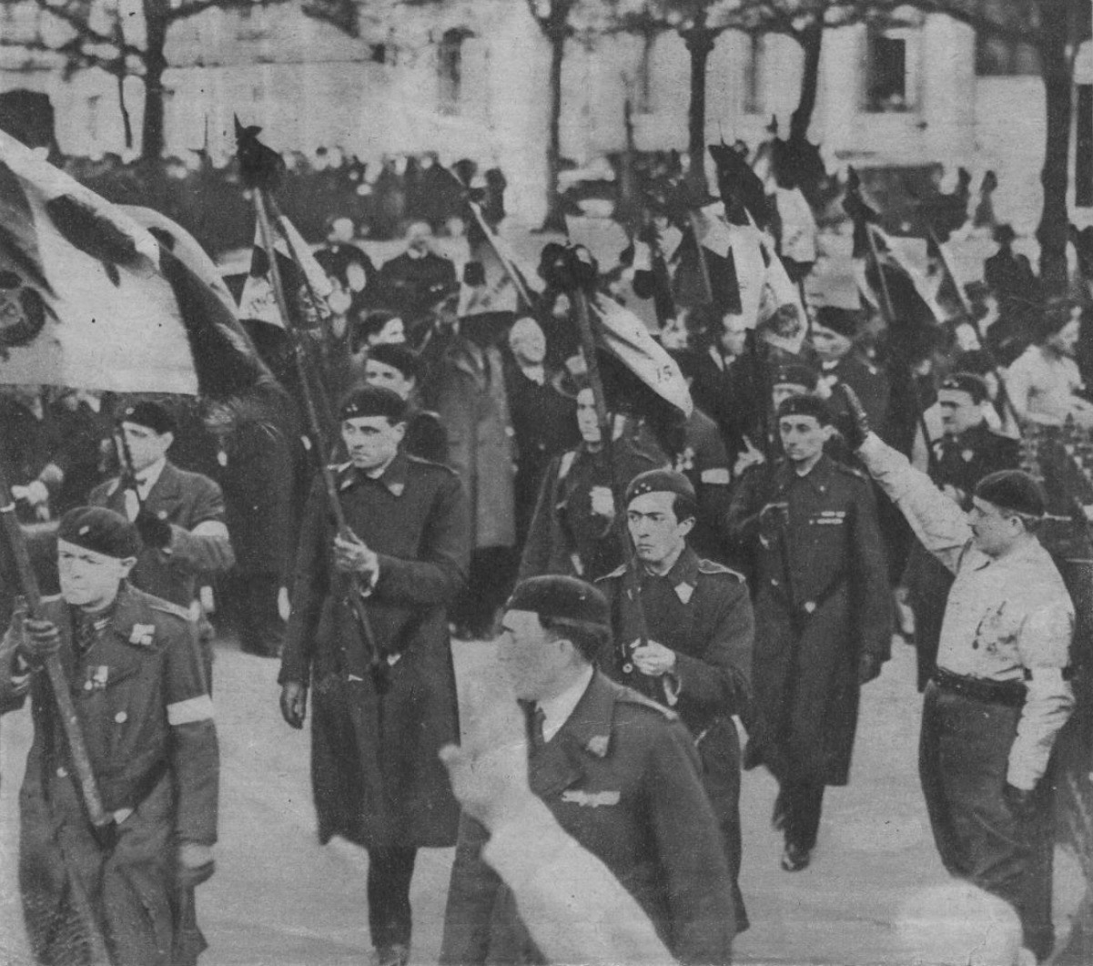 "Manifestations fascistes à Paris à la suite des événements du 6 février".